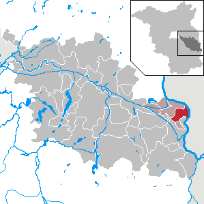 Ziltendorf in Brandenburg (Country) - District Oder-Spree